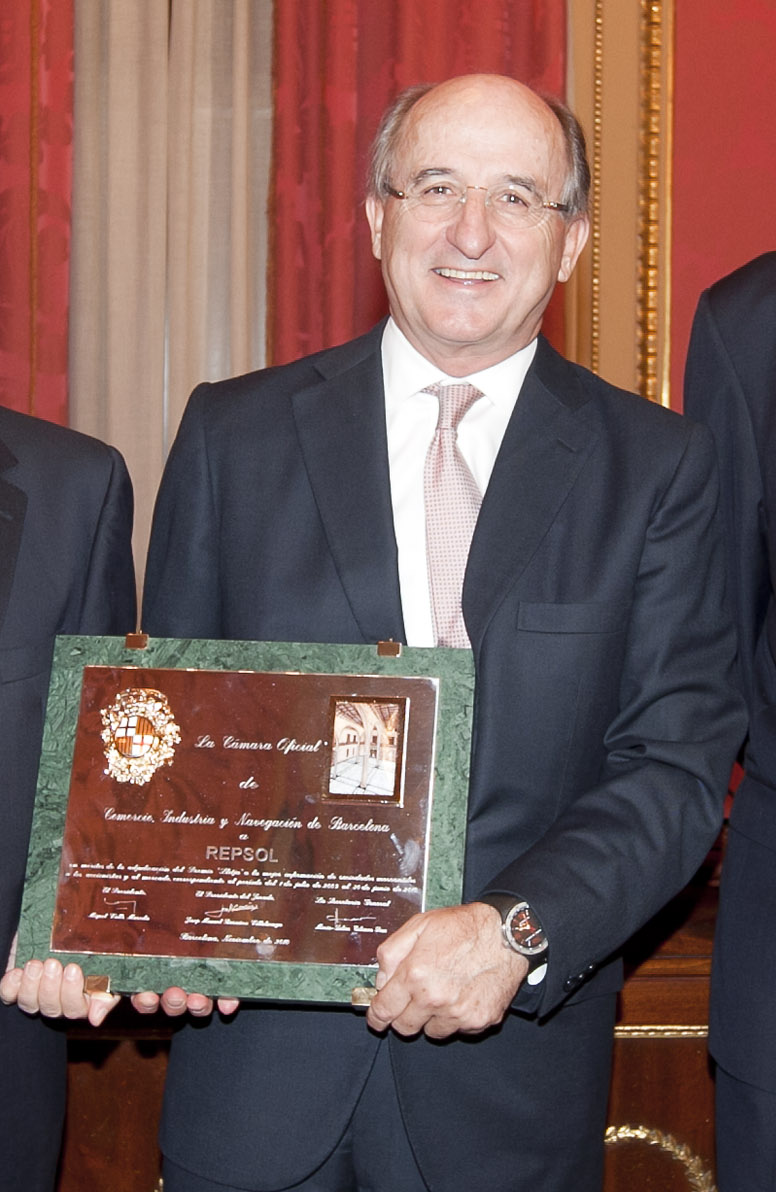 Antoni Brufau, presidente Repsol IPF, en la entrega del Premio Llotja 2010 a Repsol YPF, 23 de mayo de 2011